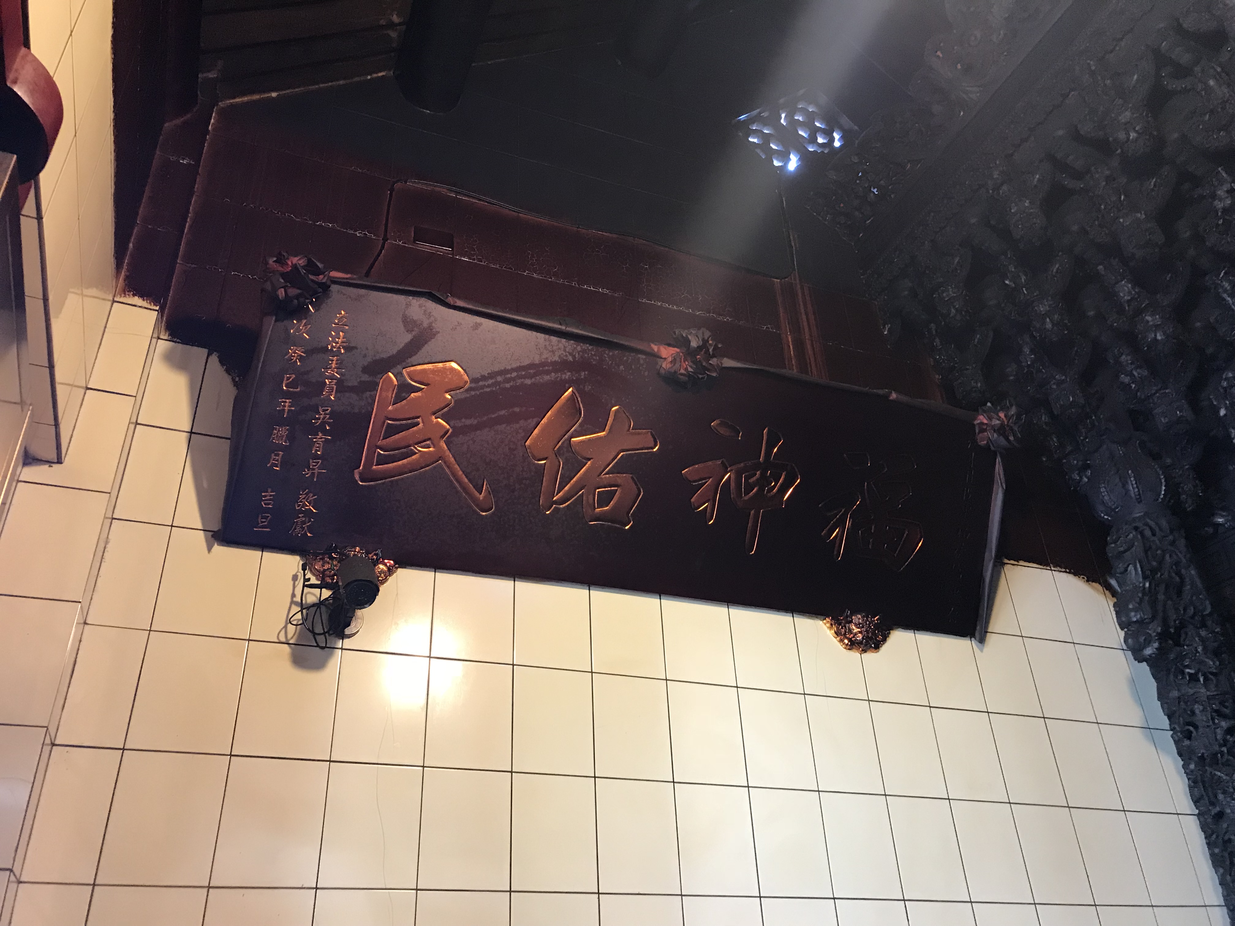 立委吳育昇贈送給北投里福德宮的匾額